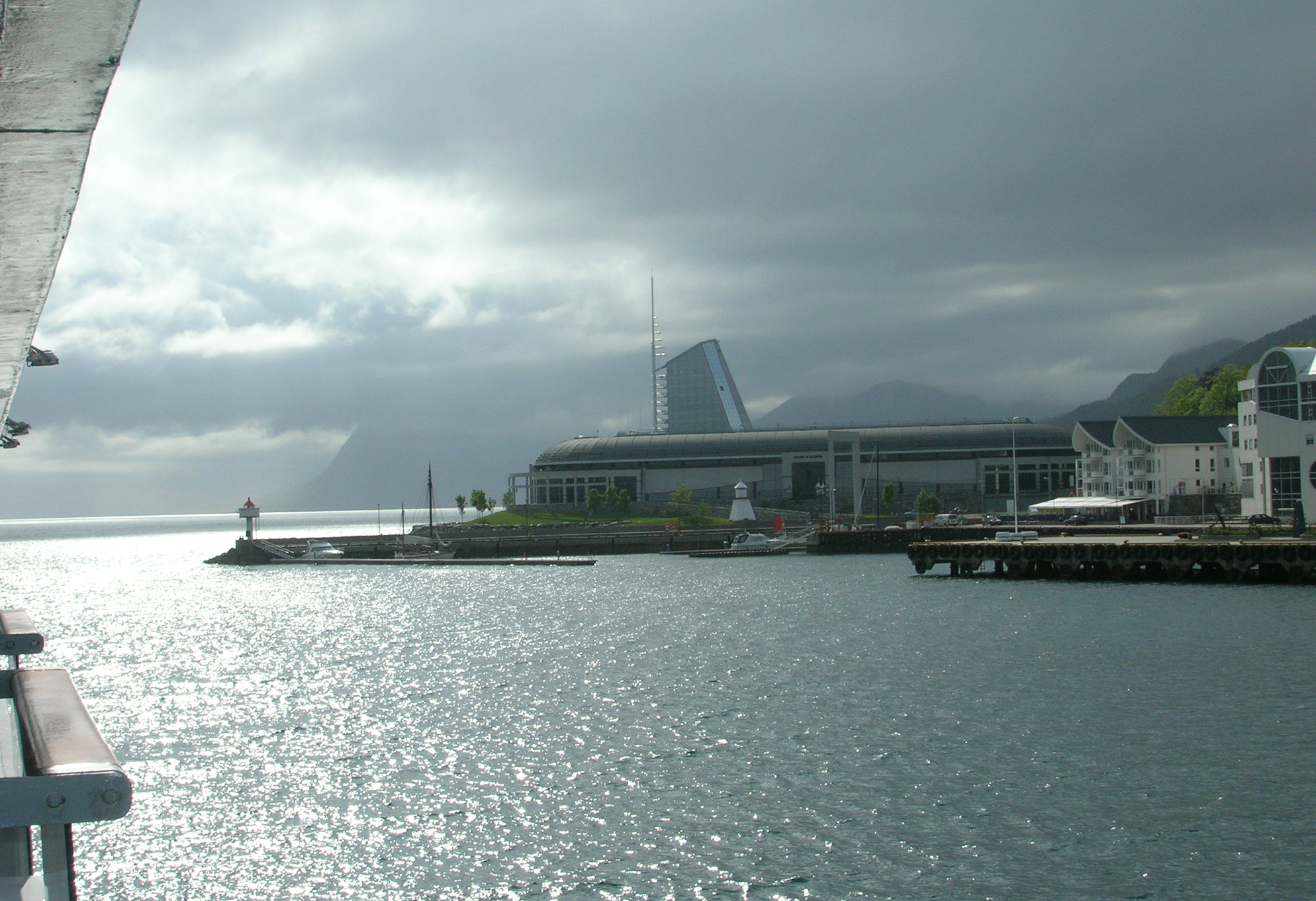 Stëmmungsbild opgeholl bei Molde an Norwegen(2006)